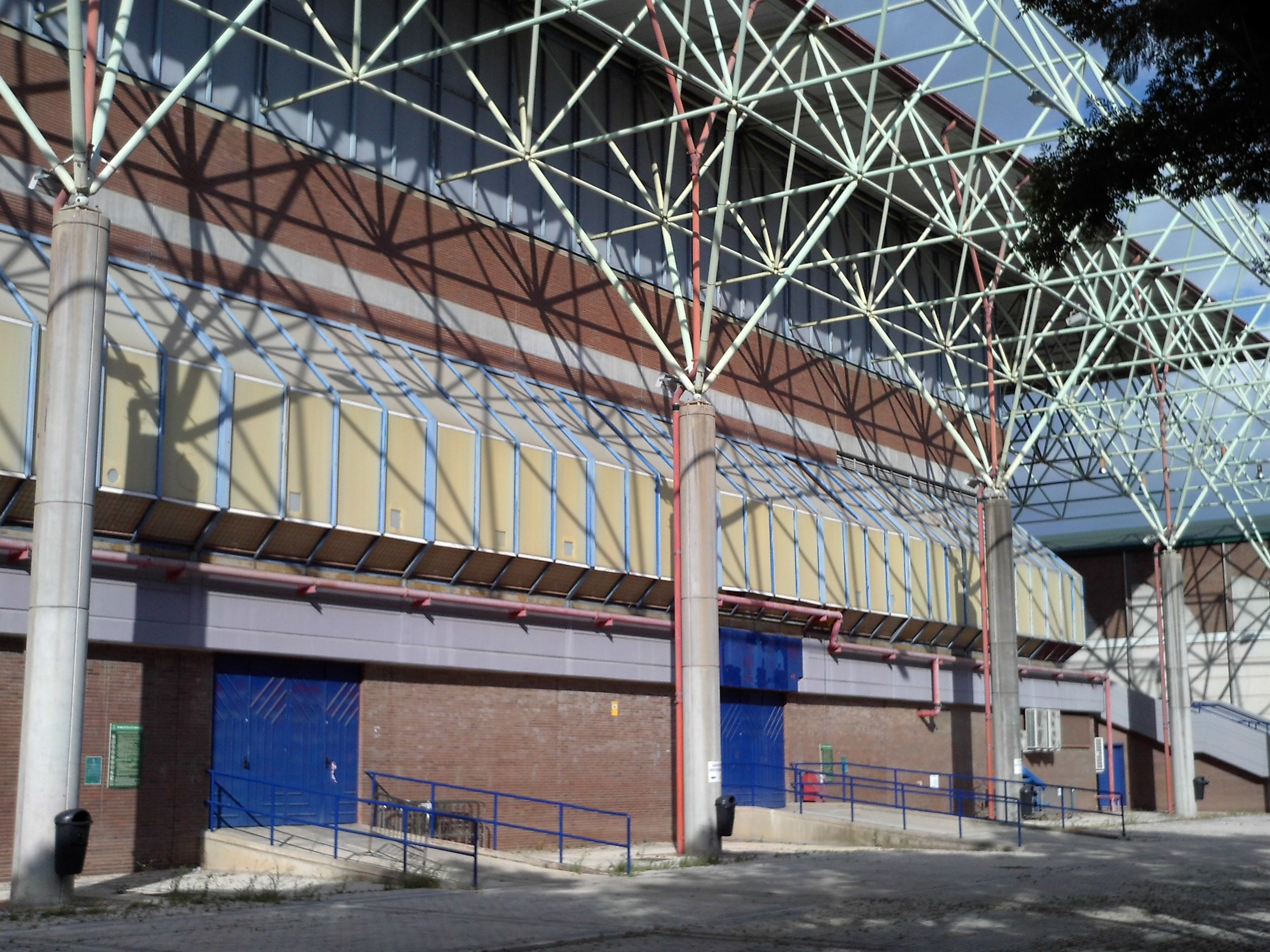 Polideportivo San Pablo. Sevilla, Andalucía, España.